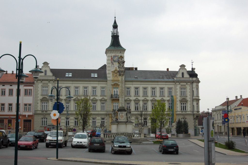 Mistelbach, Lower Austria